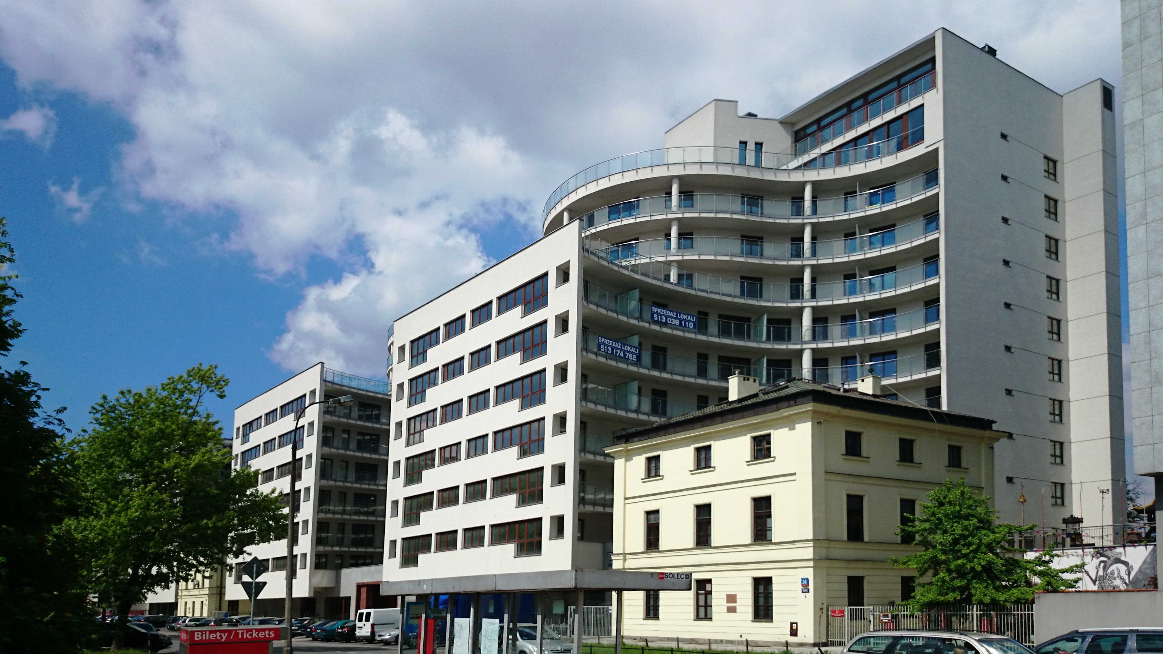 Muzeum Azji i Pacyfiku i Pacific Residence przy ul. Solec 24 w Warszawie